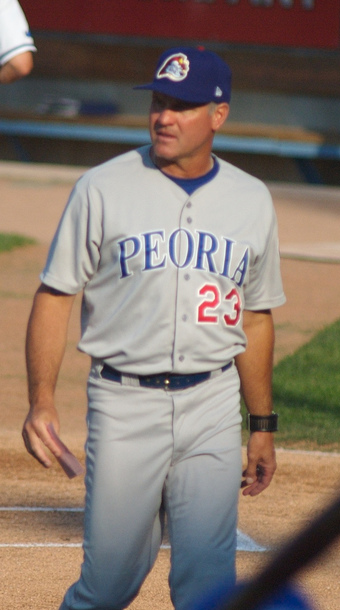 Ryne Sandberg (Peoria @ West Michigan 07302007)